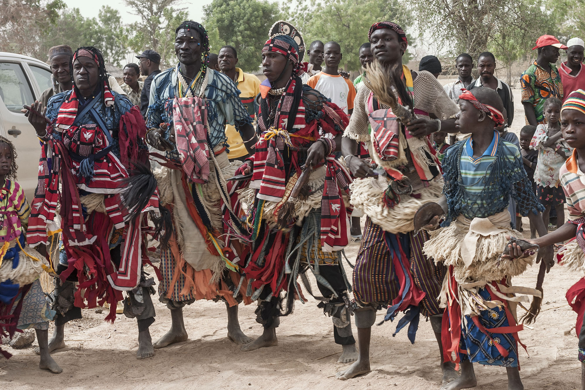 Dans un village du Plateau Central du Burkina Faso, une troupe de danseurs traditionnelles. This is an image of "African people at work" from Burkina Faso